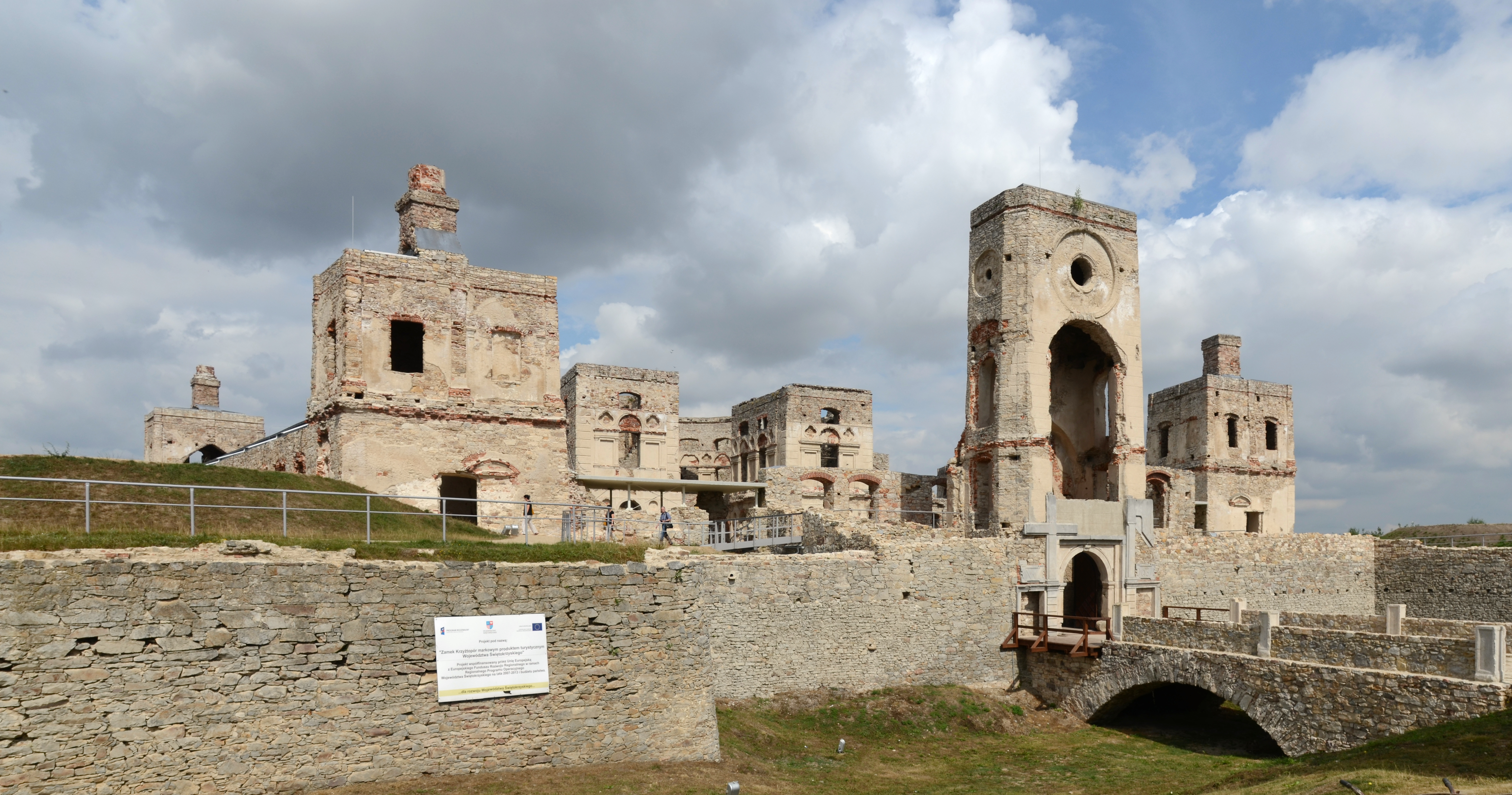 Zamek Krzyżtopór w woj. Świętokrzyskim.